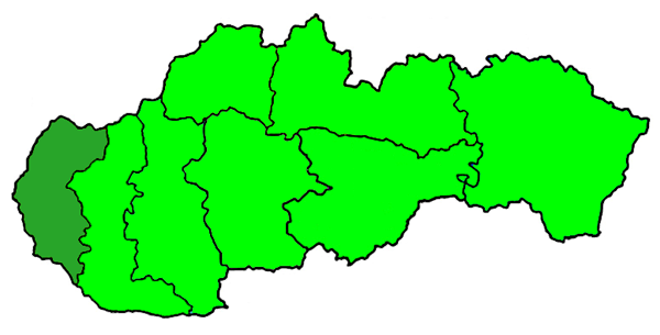 Mappa dell'arcidiocesi cattolica (roman catholic) di Bratislava, in Slovacchia. Lavoro personale.